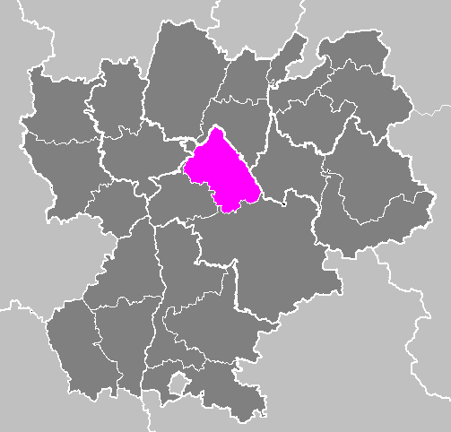 Maps of arrondissements and cantons of France: Arrondissement de la Tour-du-Pin.PNG (Région Rhône-Alpes)